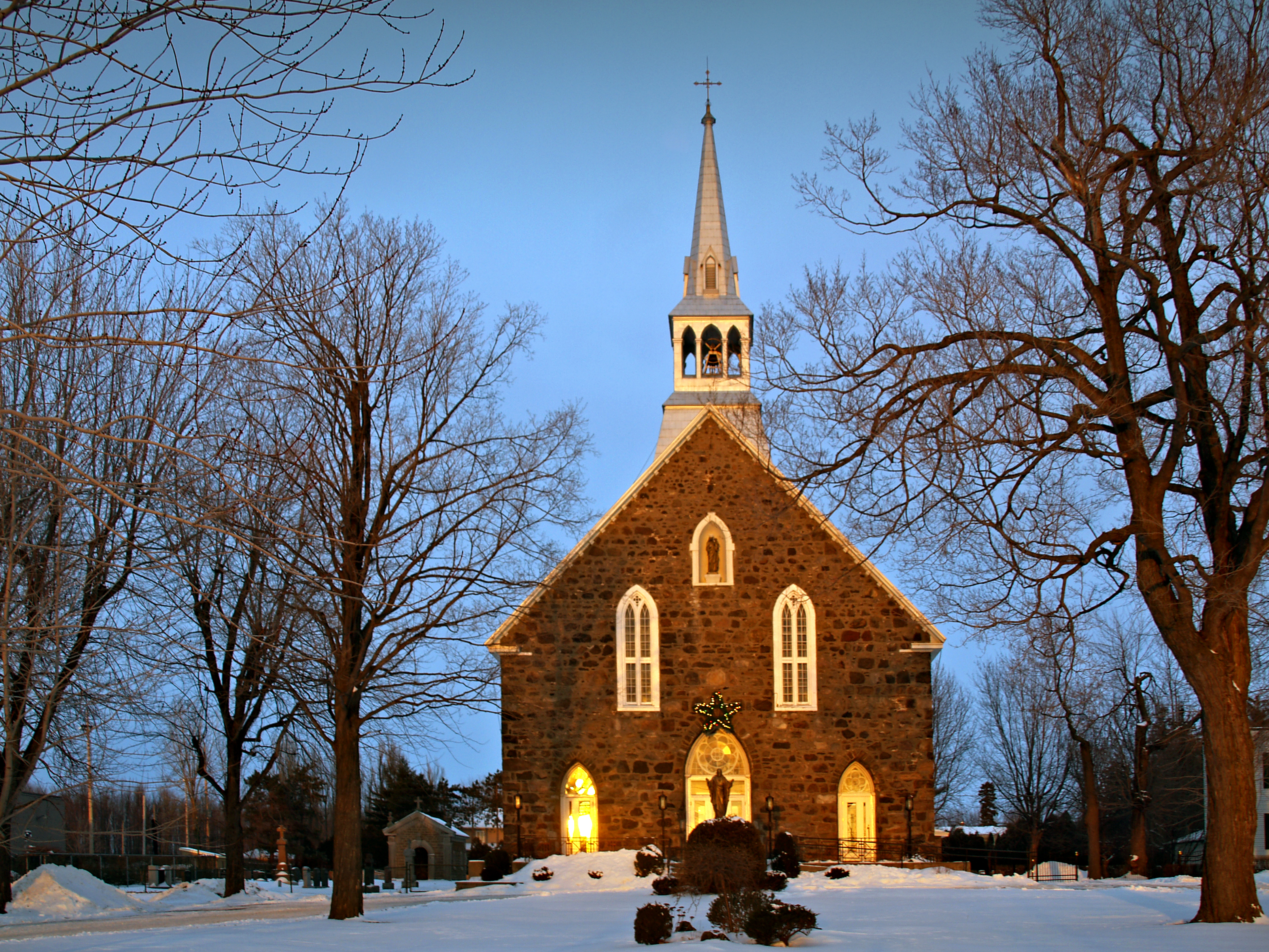 Richelieu, Montérégie (Québec) - Notre-Dame de Bonsecours